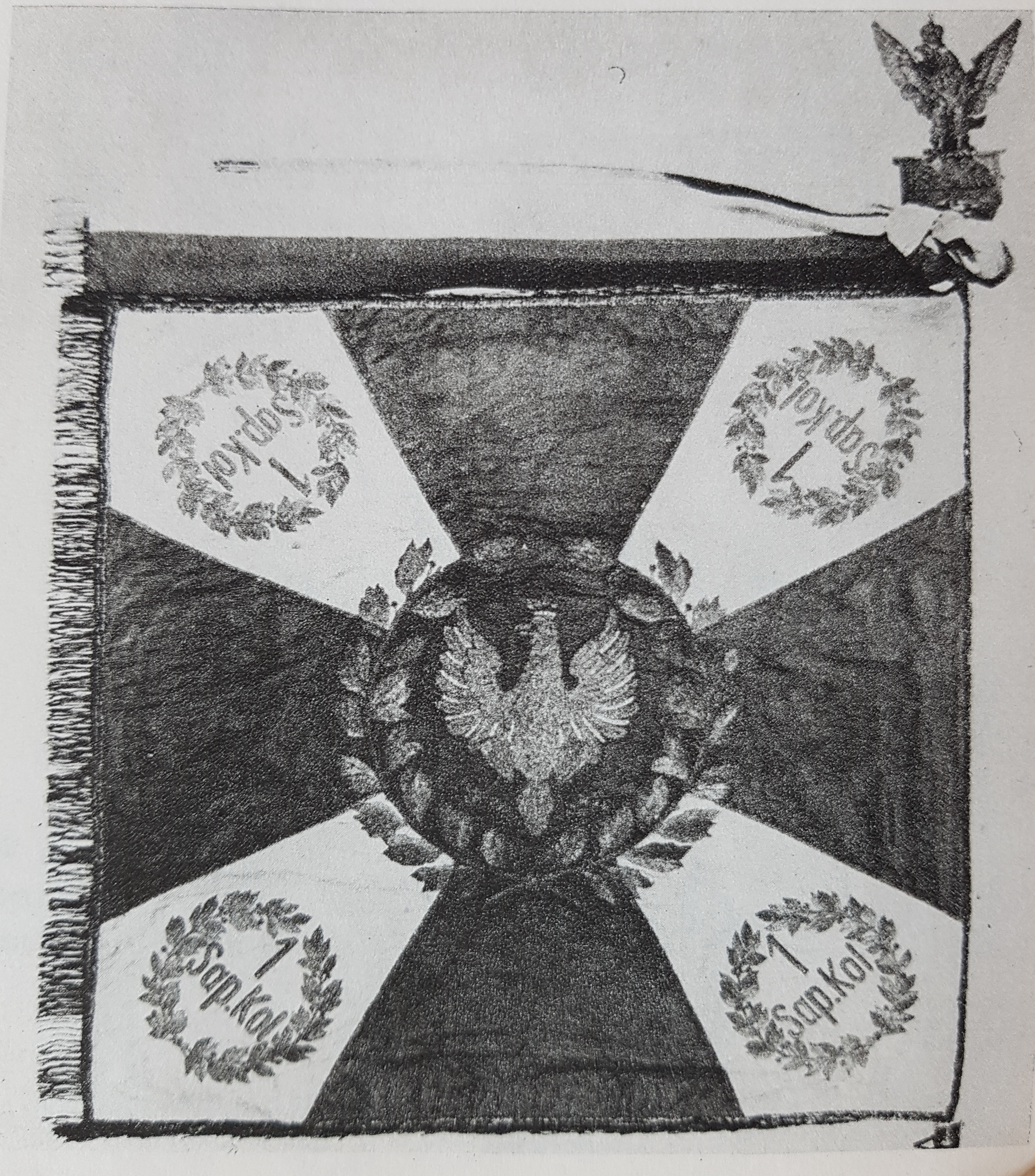 lewa strona sztandaru 1 psap.kol.